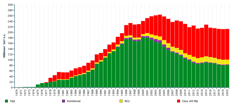 Graf over norsk kulbrinteproduktion fordelt efter type